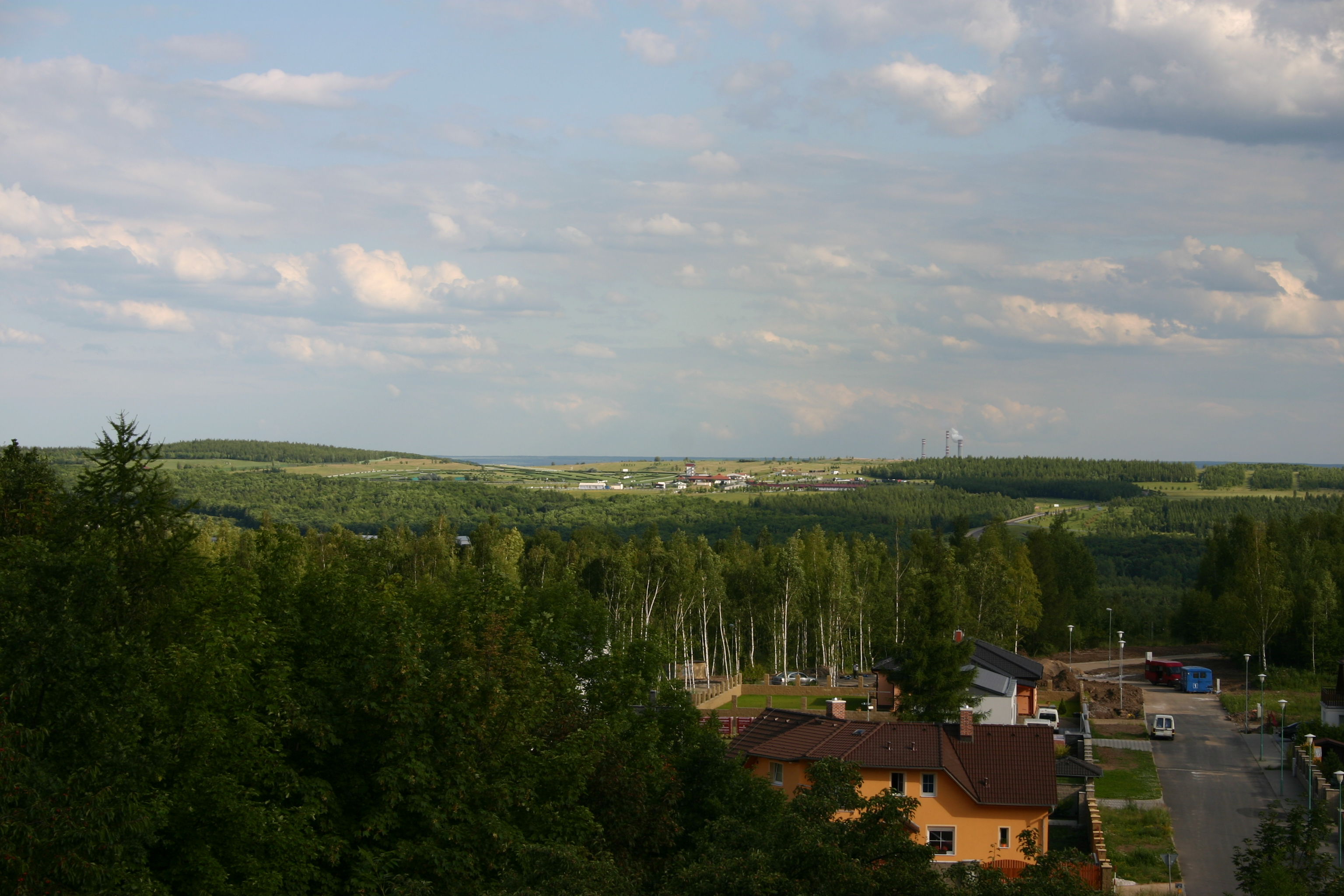 Hipodrom Most na Velebudické výsypce